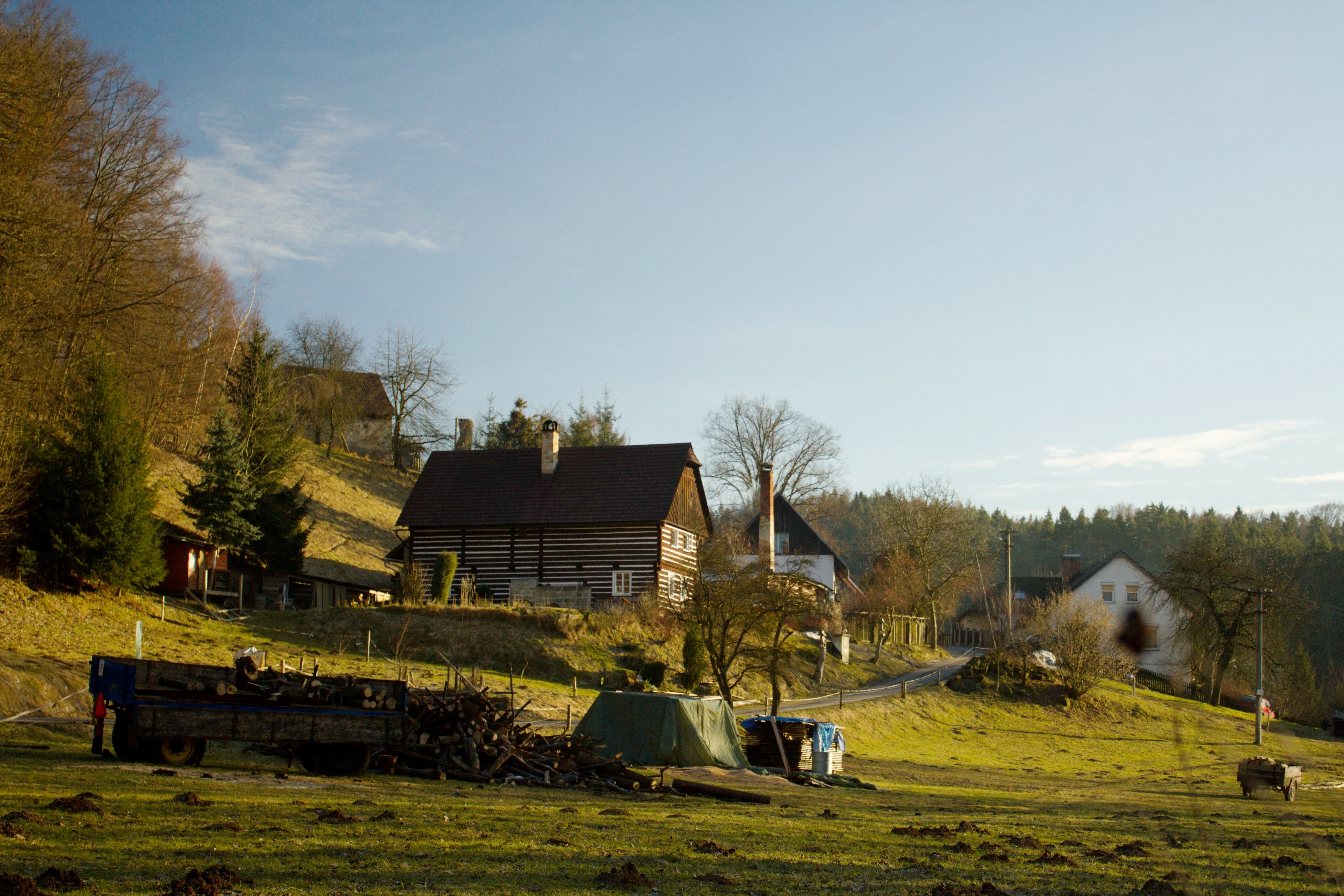 Kacanovy - část obce